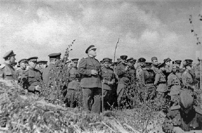 Командующий 2-м Прибалтийским фронтом генерал армии А.И. Ерёменко на полевых занятиях с командирами 1-й ударной армии перед началом летней кампании 1944 года